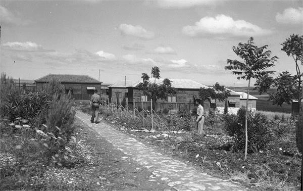 דליה - מראה הקיבוץ דליה.